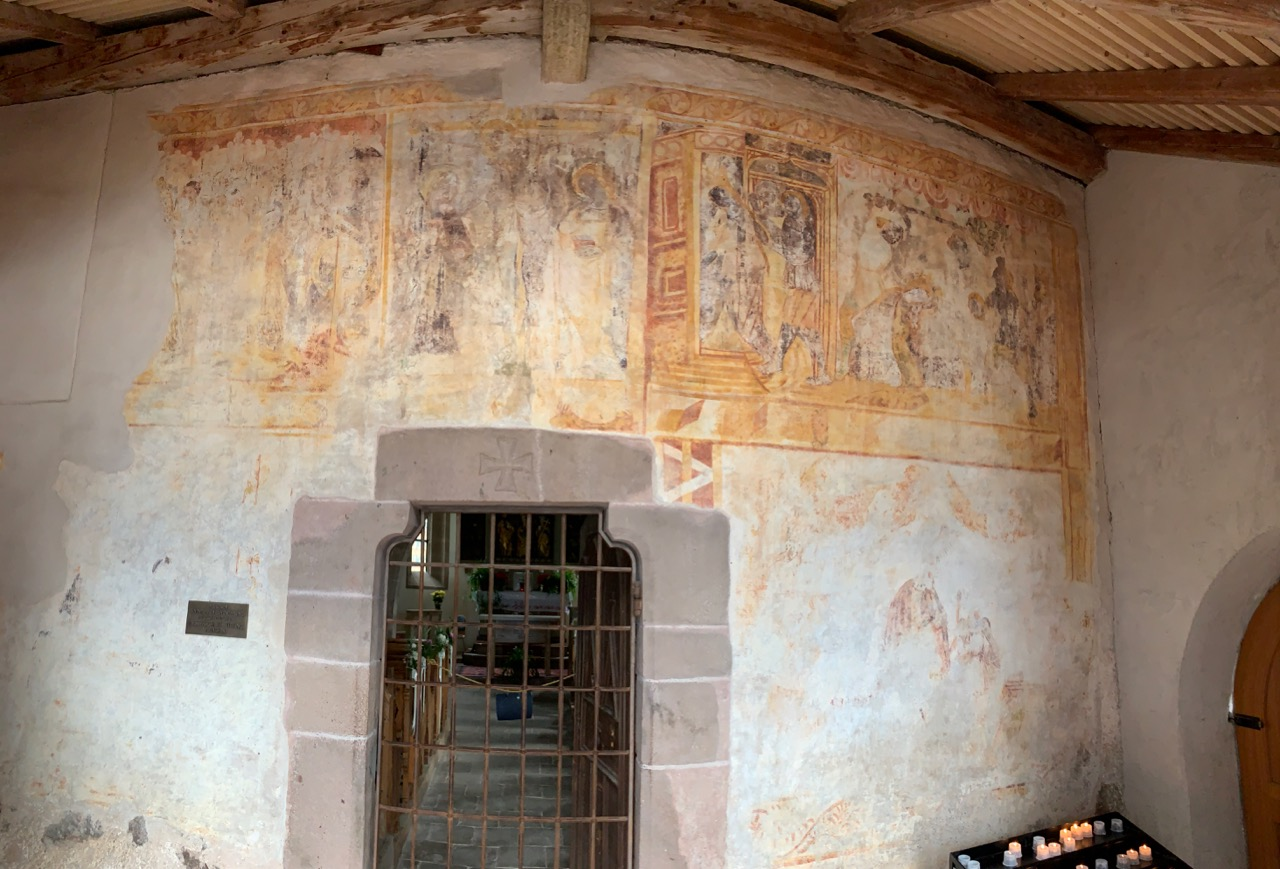 Foto der Wandmalerei im Vorraum der Kapelle Sankt Kathrein in Hafling